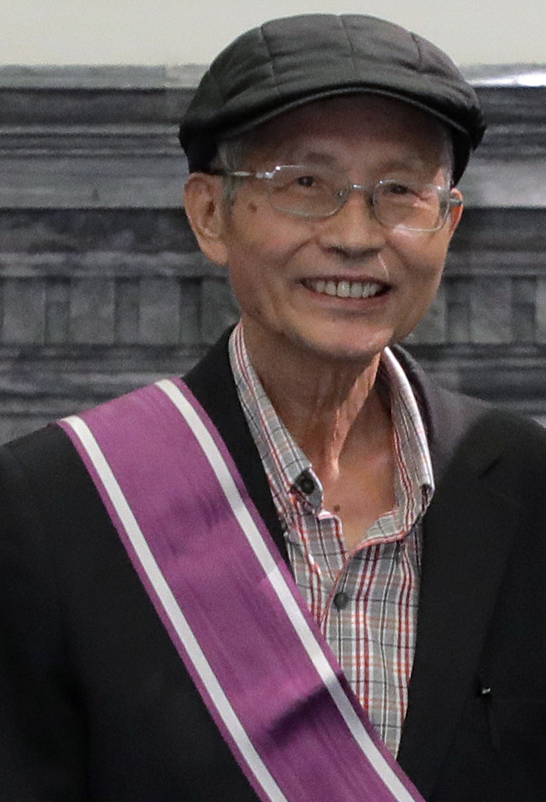 中文（台灣）: 09.27 總統頒授行政院農業委員會前副主任委員戴振耀「三等景星勳章」，並合影